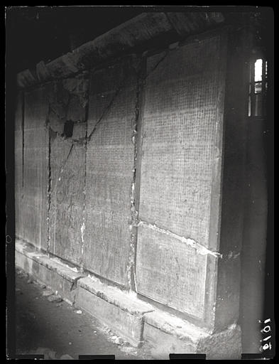 [Shaanxi]. Xi'an, les livres classiques gravés sur pierre en 837 ap. J.-C. (Pei lin) [Beilin]